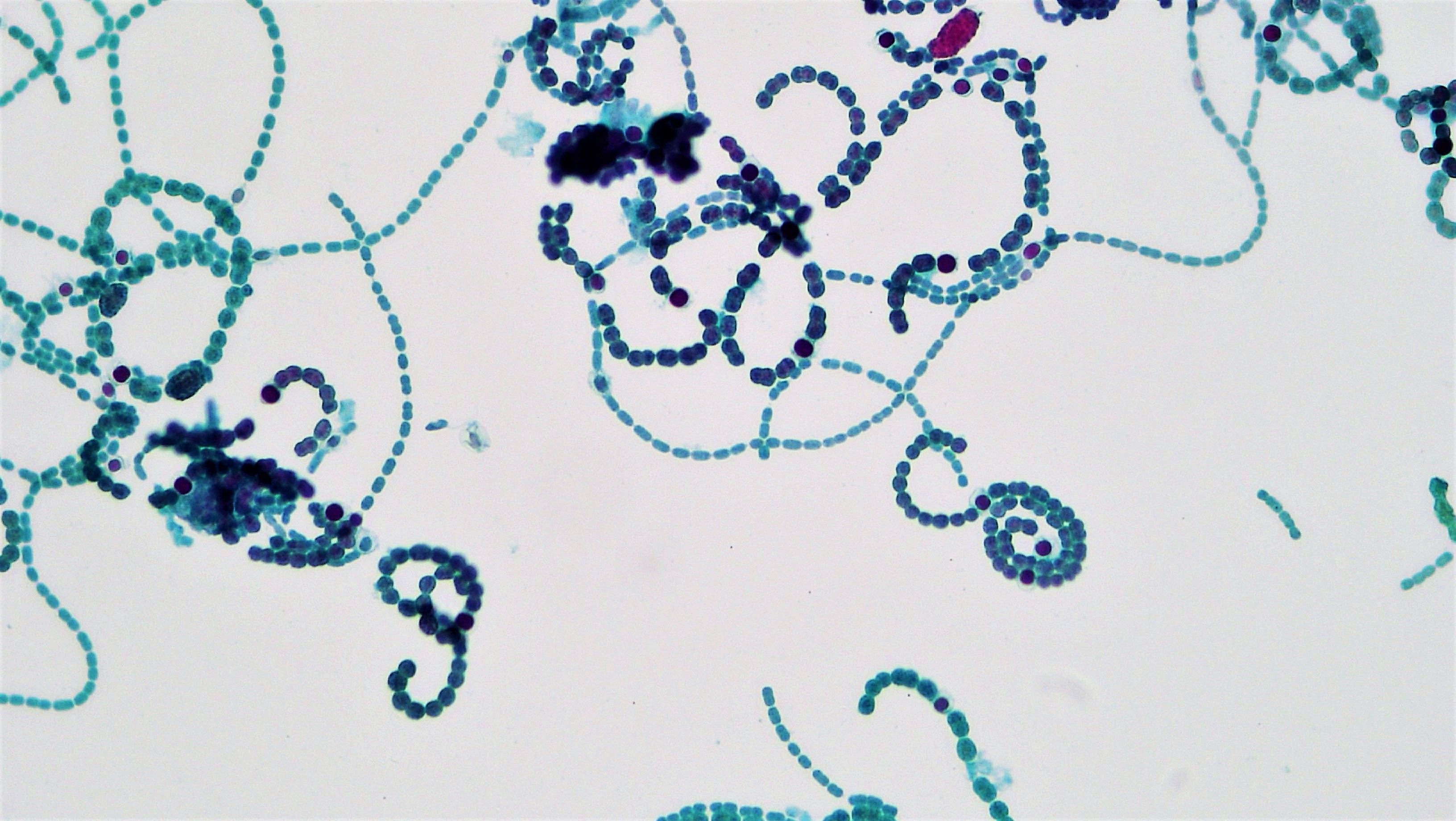 magnification: 400x